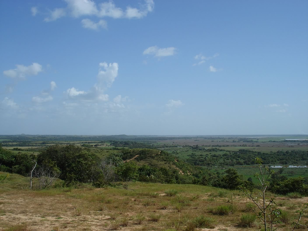 Puerto Lopez, Meta - Colombia